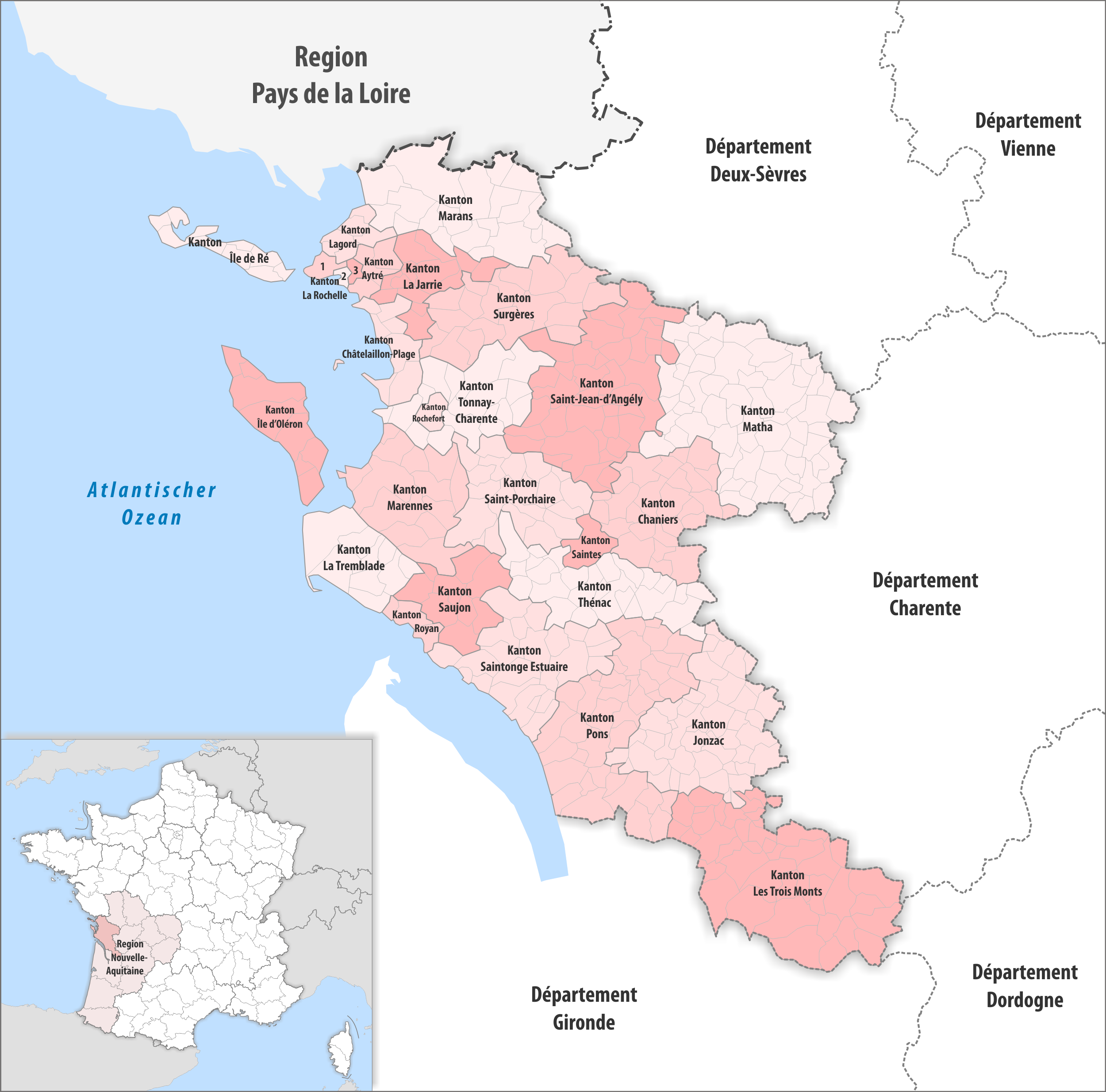 Gemeinden und Kantone im Departement Charente-Maritime